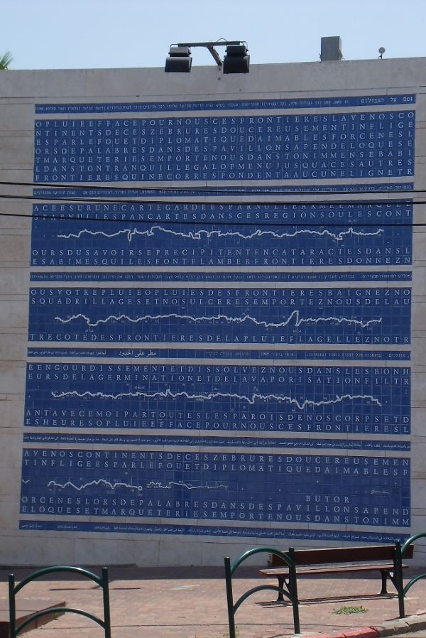 Pan de la facade du batiment de l'association de la Maison de la vigne, Beit Hagefen, sis à Haïfa en Israël. Il s'agit d'un texte de Michel Butor pouvant être lu en hébreu, en français et en arabe.